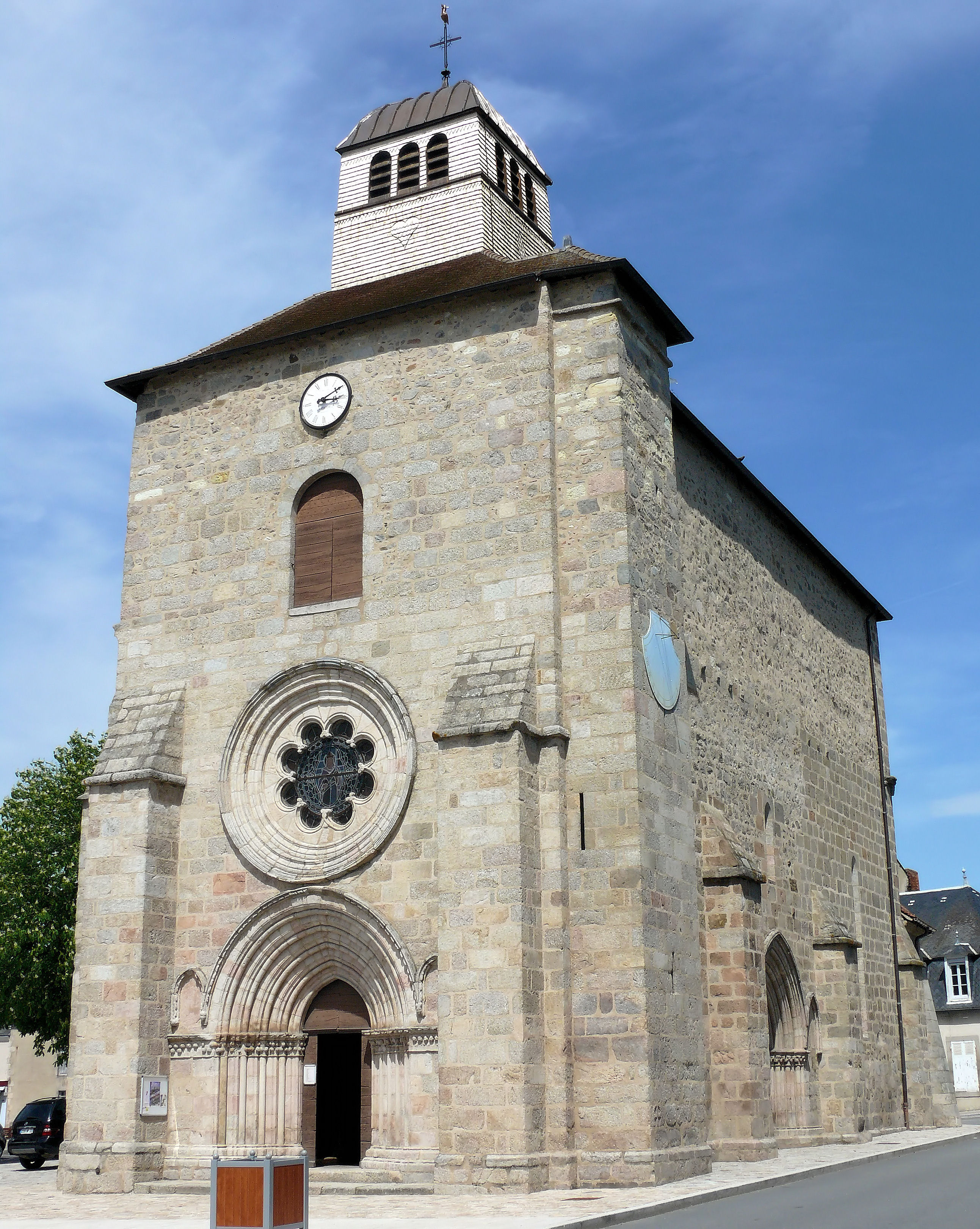 Gouzon - Église Saint-Martin - Ensemble